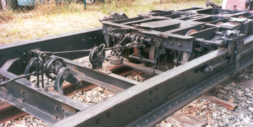 Heberleinova brzda na podvalníkovém voze. Kurort Oybin srpen 2006. Petr Sporer